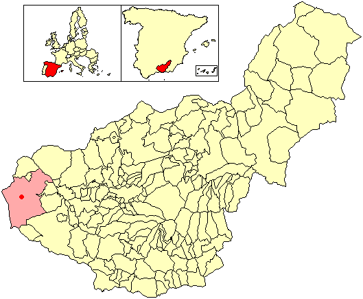 Situación de la localidad de Riofrío (en el municipio de Loja) respecto a la provincia de Granada, en España.